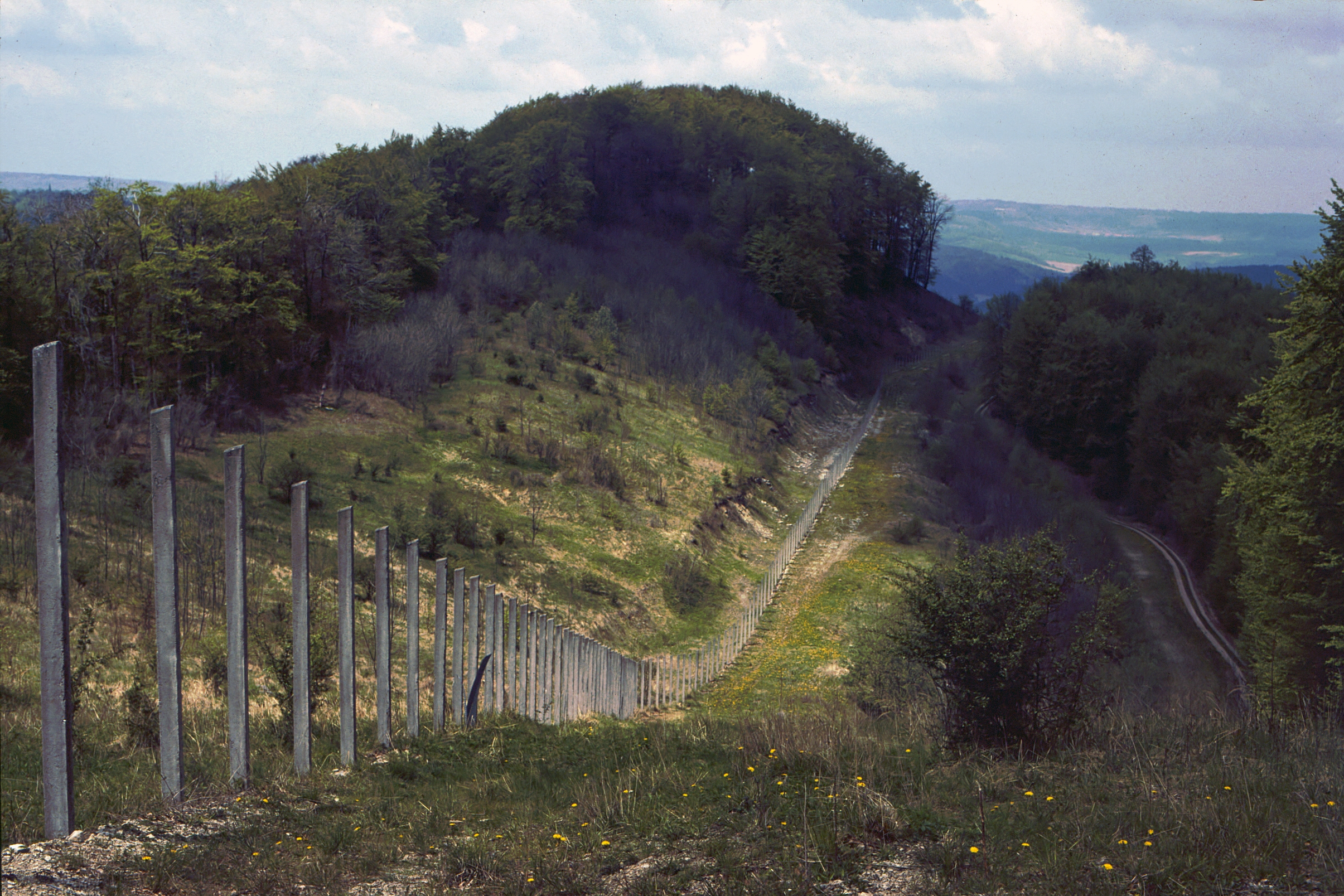 Ehemalige Zonengrenze hinter der Plesse 1993 (Richtung Ost)